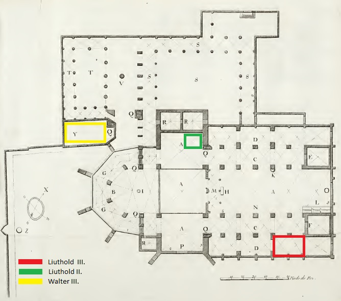 Grundriss des Basler Münsters mit Kennzeichnung der Bestattungsplätze der drei dort bestatteten Herren von Rötteln. Lüthold II. - vor dem Stefansaltar in der Apsidiole des südlichen Querschiffes; Lüthold III. - in der Marienkapelle; Walter III. in der Nikolauskapelle.